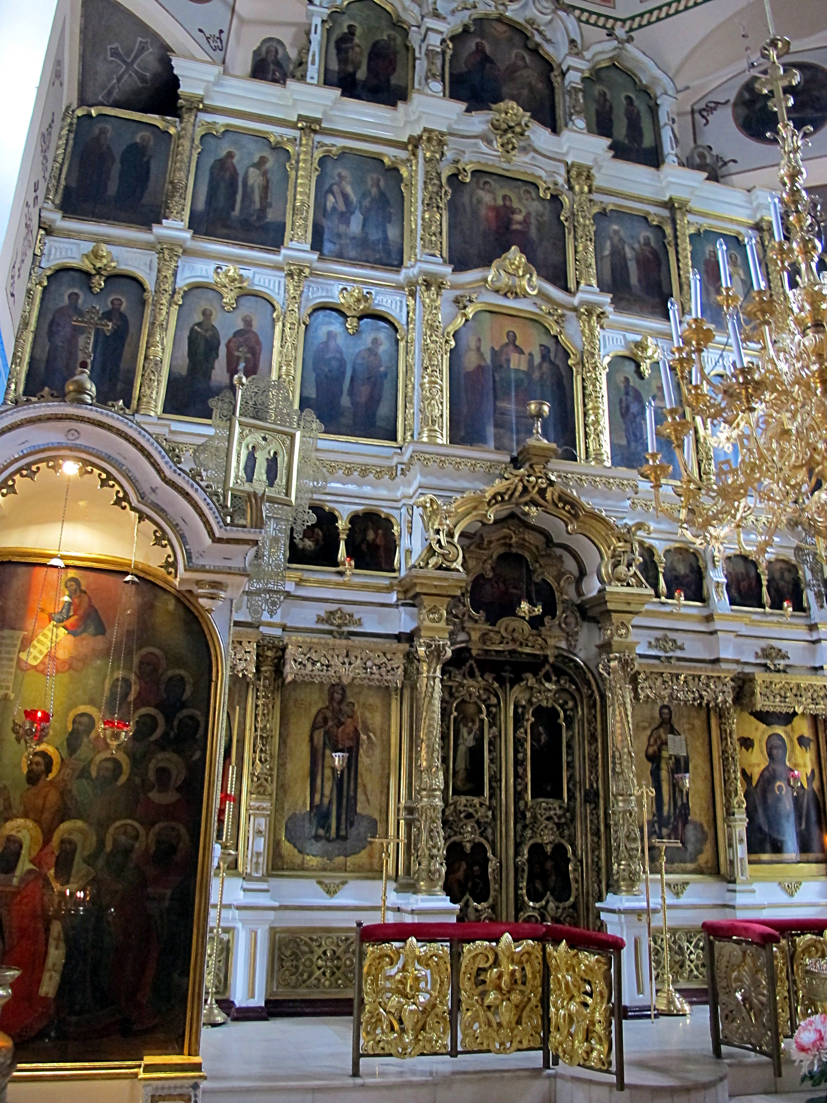 Фрагмент иконостаса Храма Святых Апостолов Петра и Павла у Яузских ворот